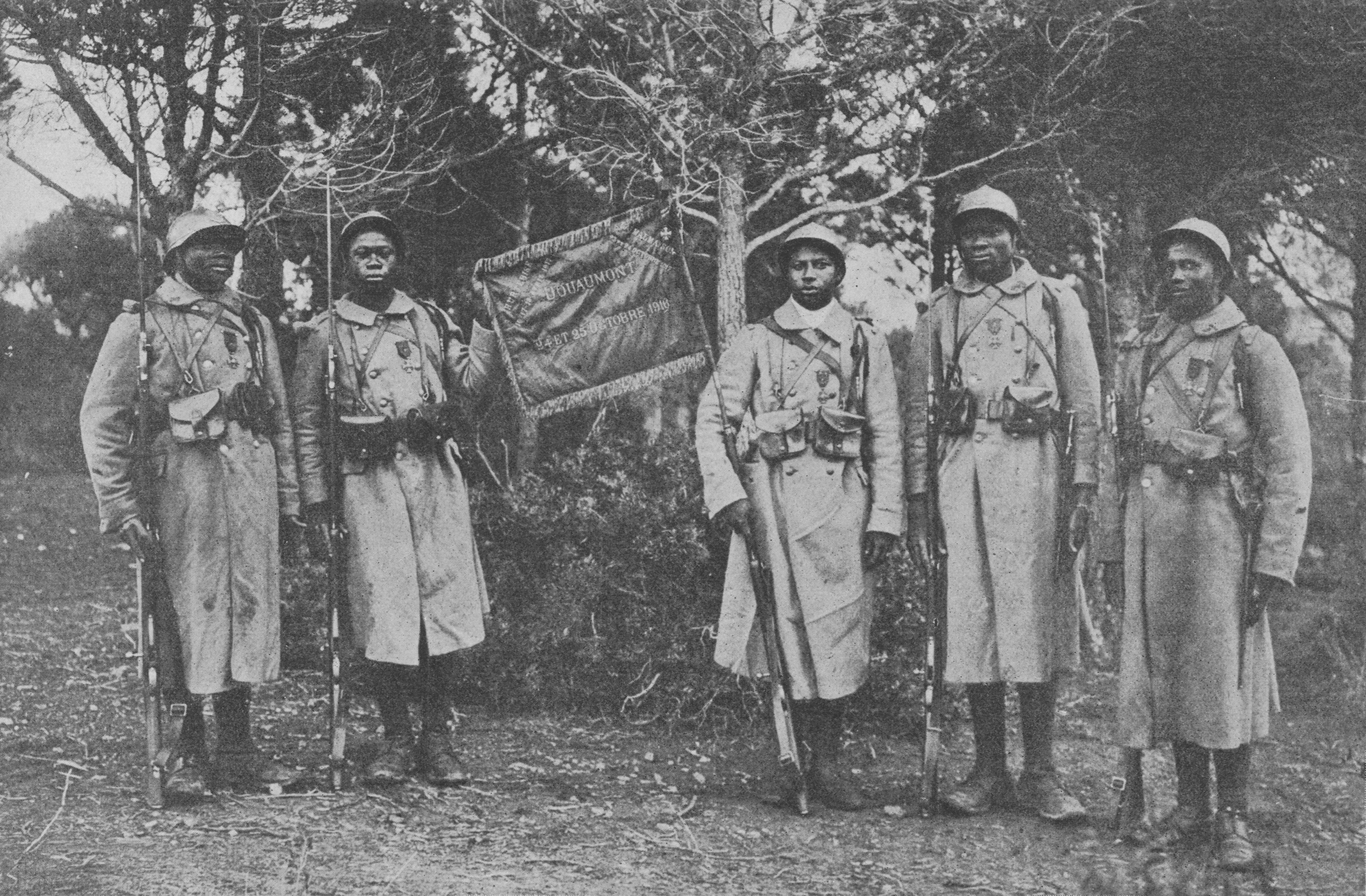 Scan of L'ILLUSTRATION No 3906 12 Janvier 1918. Le fanion du 43e bataillon de tirailleurs sénégalais décoré de la fourragère.